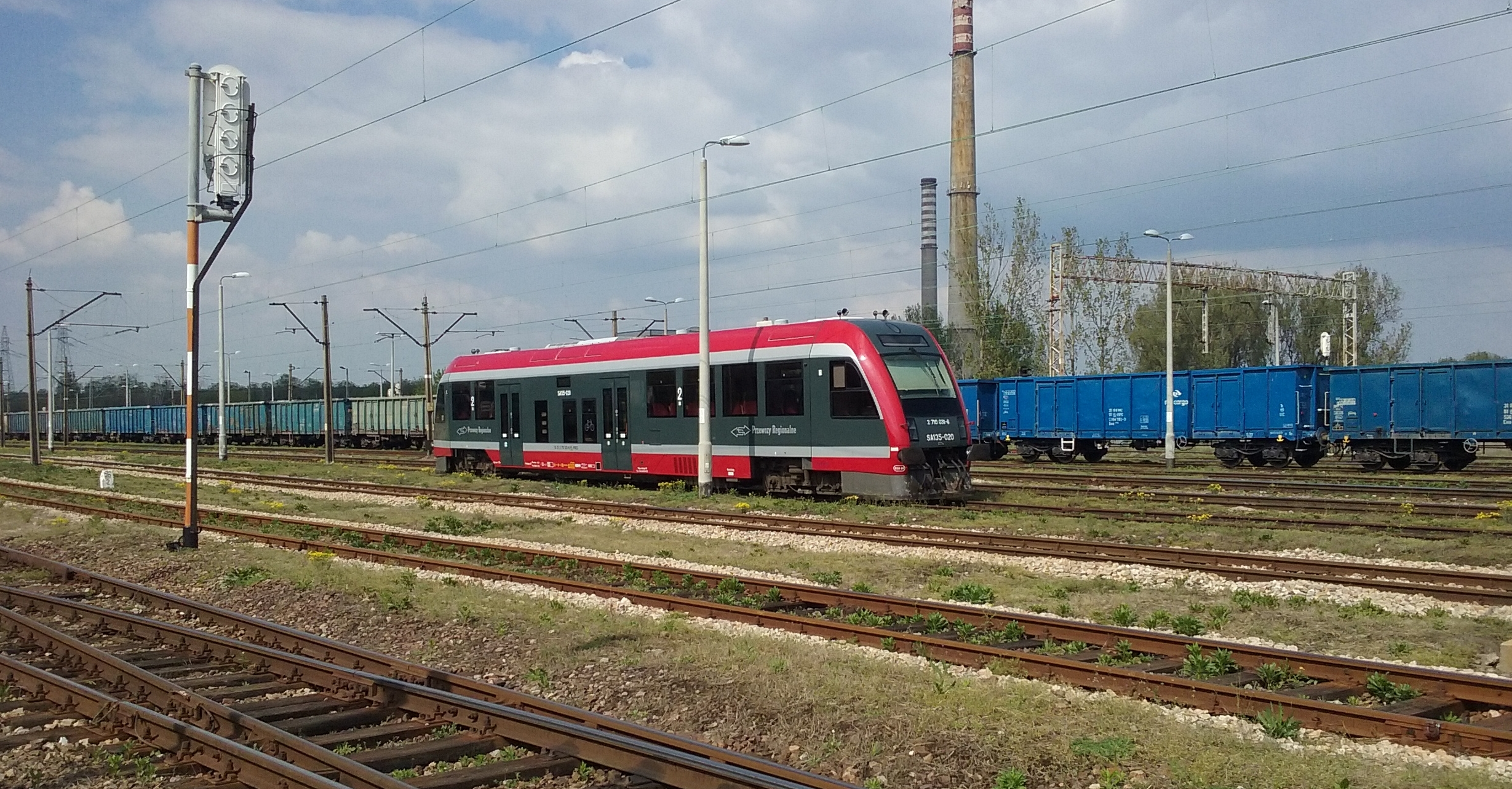 Tomaszów Mazowiecki - pociąg Przewozów regionalnych na stacji